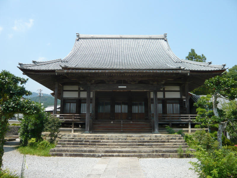 垂井町岩手、明泉寺本堂